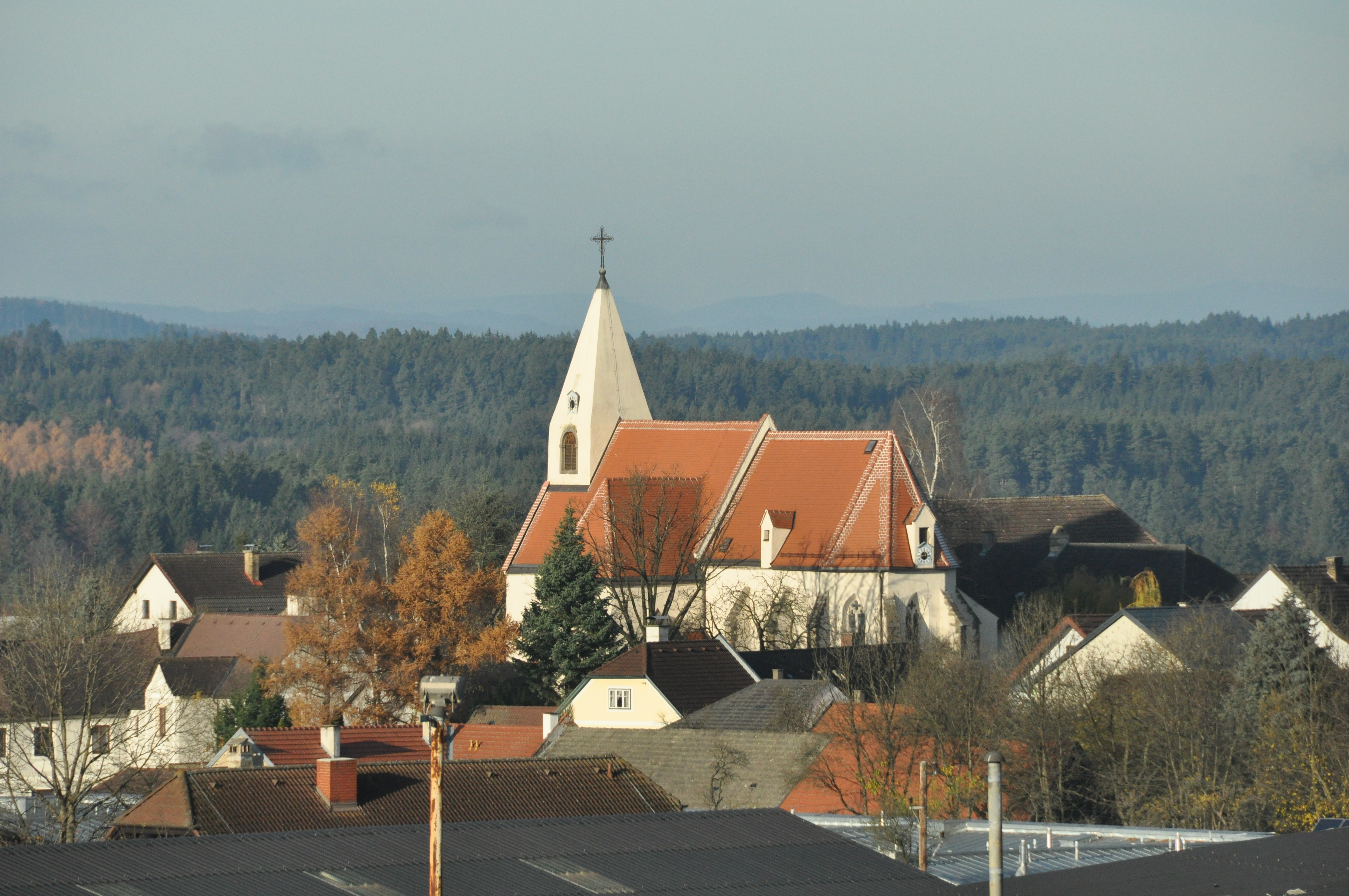 Pfarrkirche " Maria Himmelfahrt "